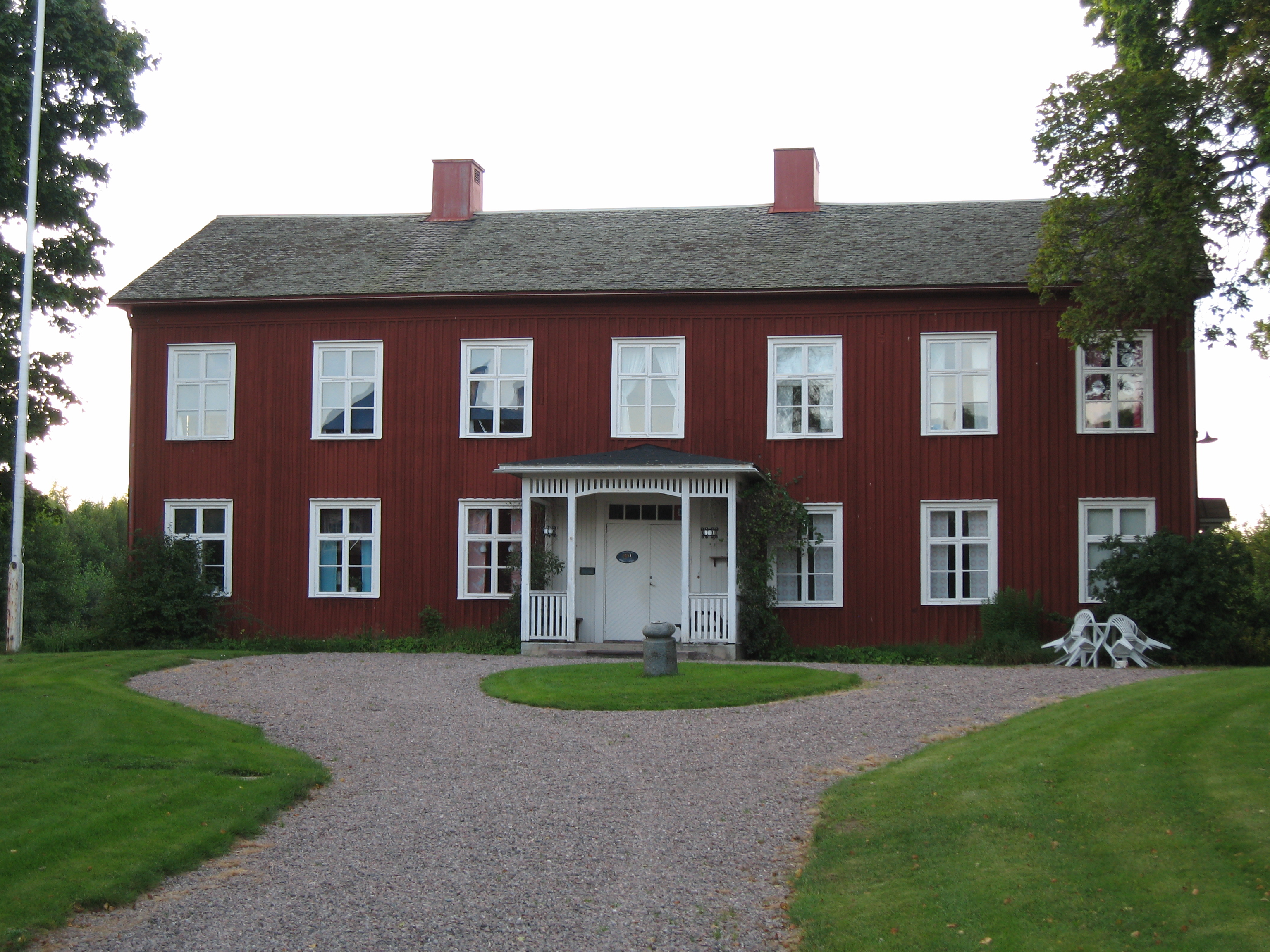 Edsleskogs prästgård i Åmåls kommun. I bebyggelseregistret ÅMÅL EDSLESKOGS PRÄSTGÅRD 1:35 - husnr 3. Byggnadsminne Edsleskog 47:1.